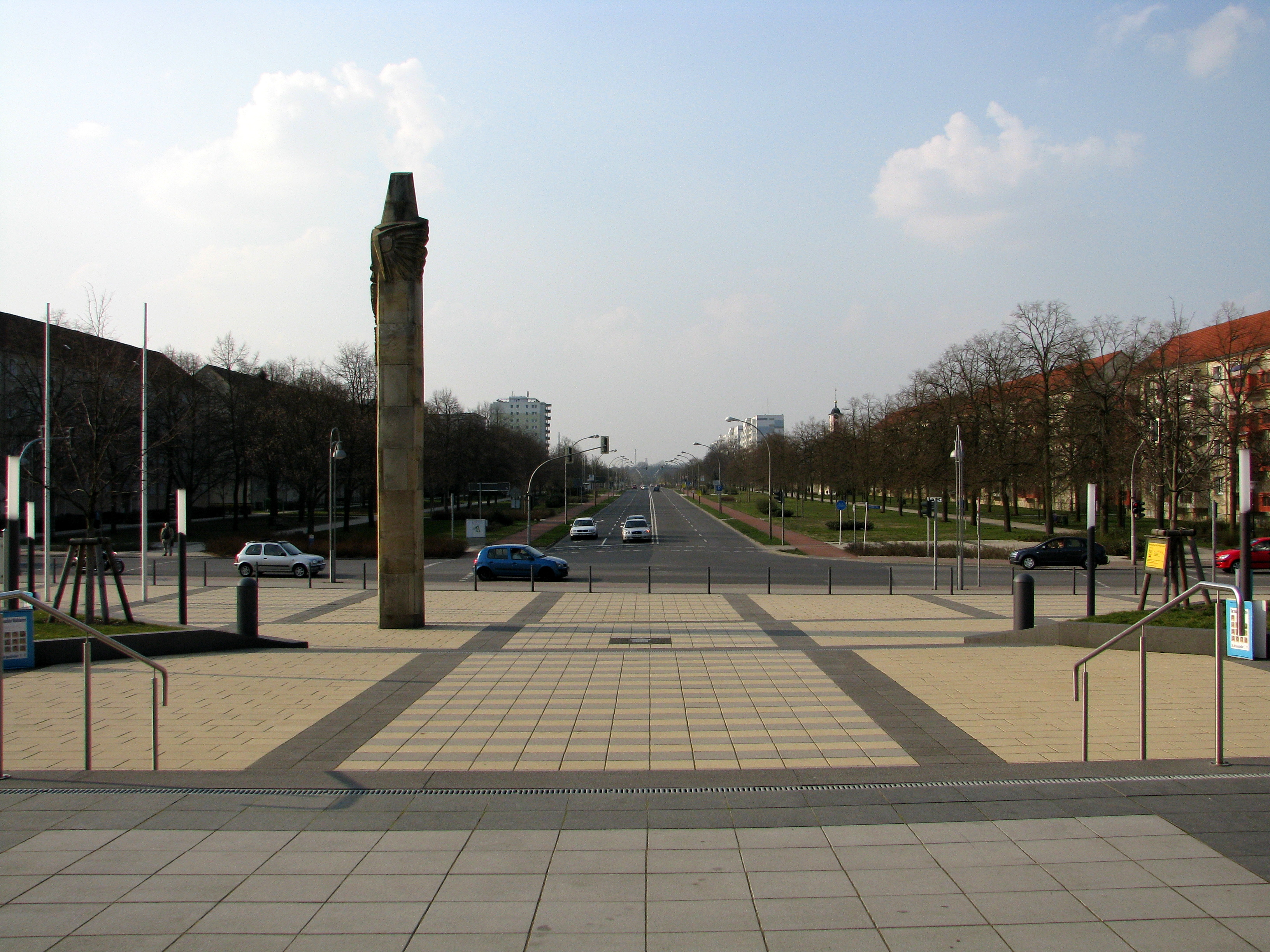 Die Lindenallee (früher Leninallee) mit Stele "Kraft der sozialistischen Kultur", 1976–1984 von Arnd Wittig, in Schwedt an der Oder